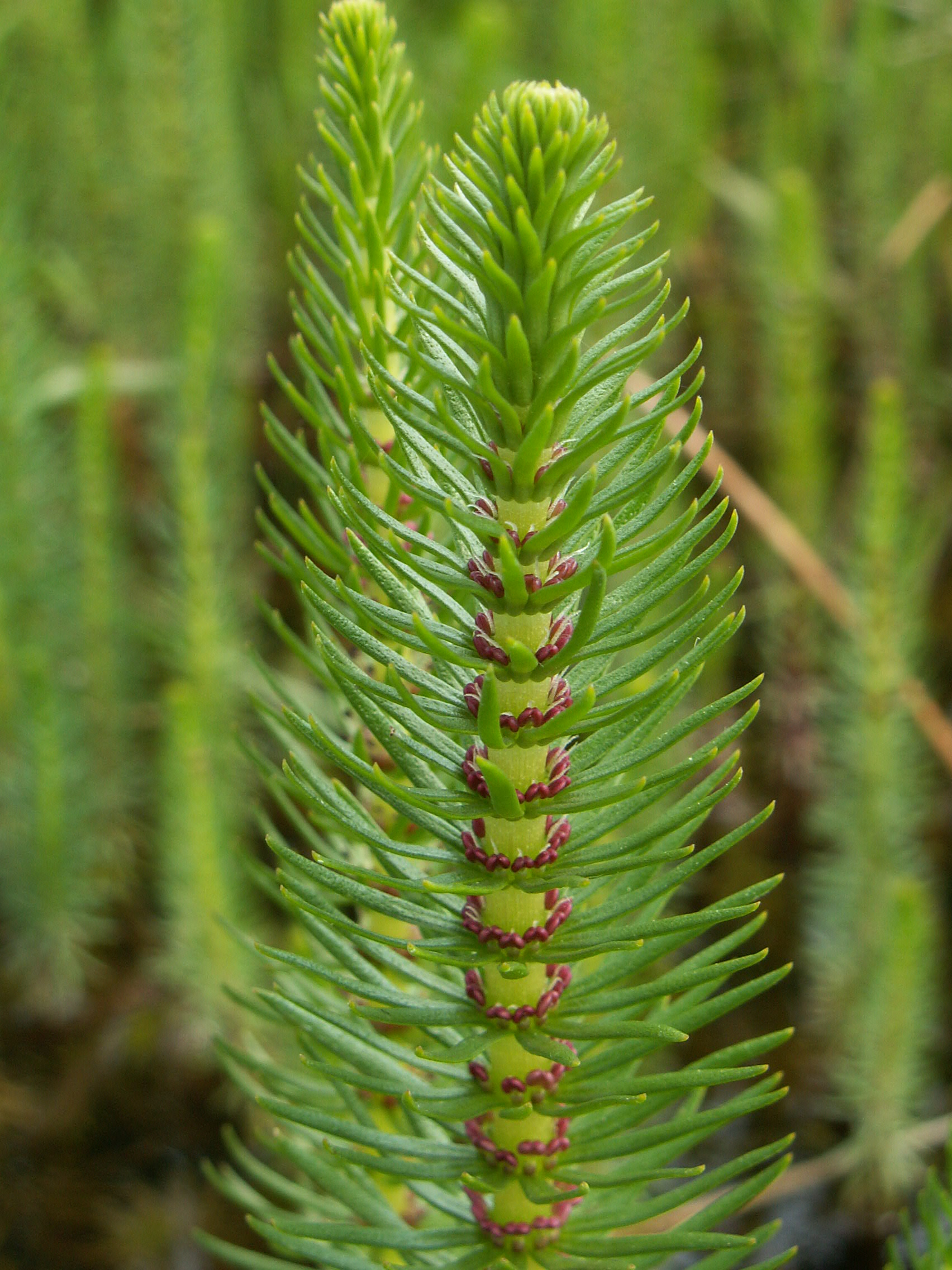 Hippuris vulgaris on Miedwie Lake, NW Poland, blooming